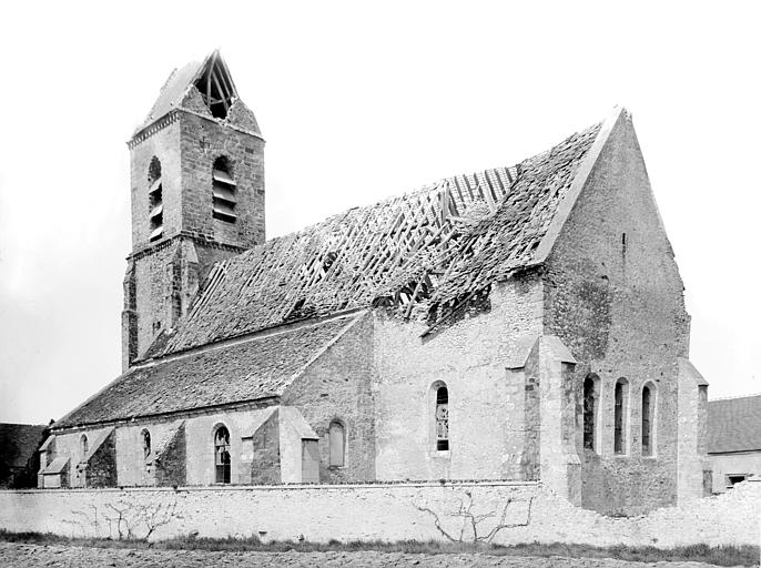 Ensemble sud-est